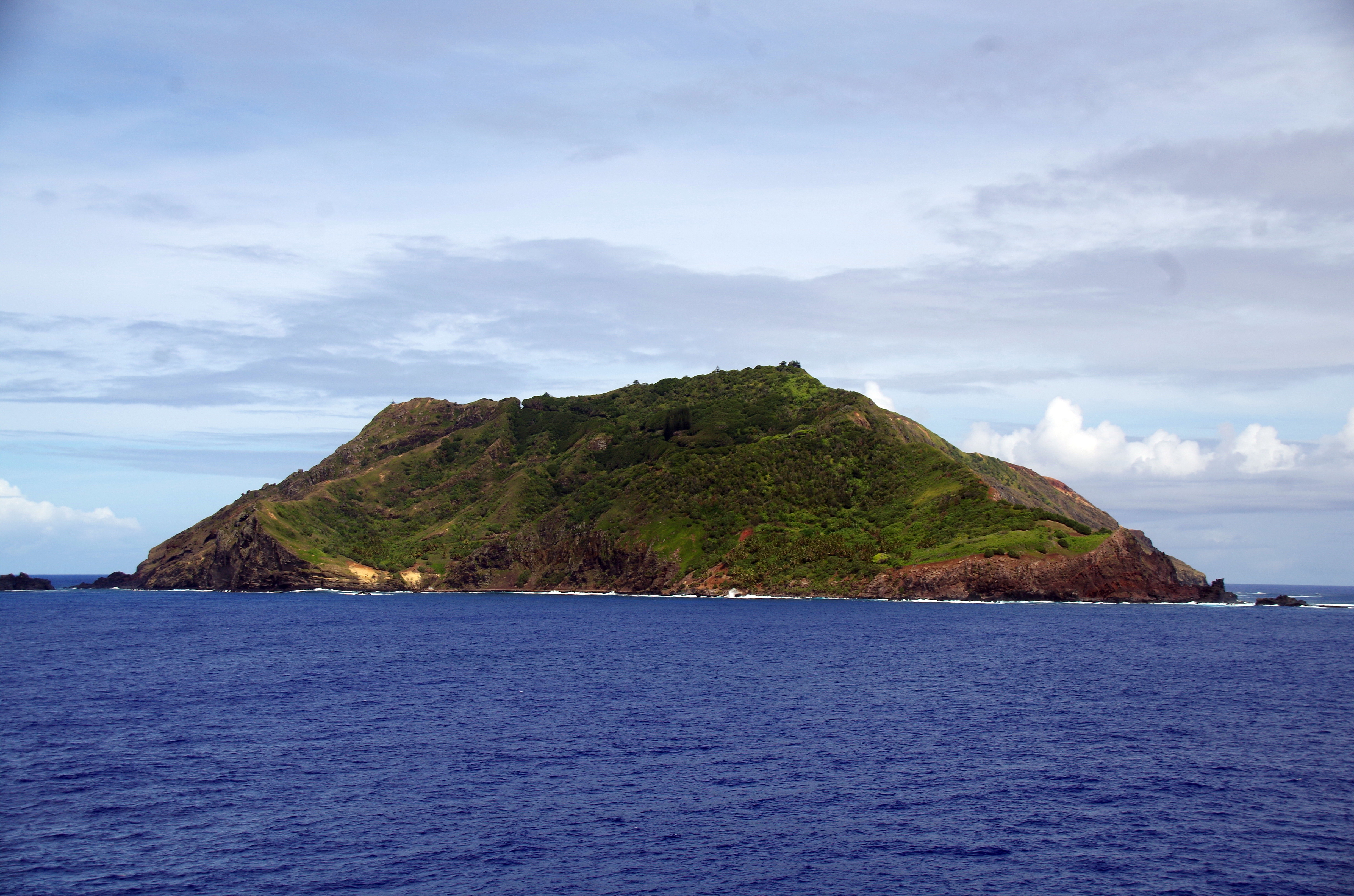 Insel von SW gesehen